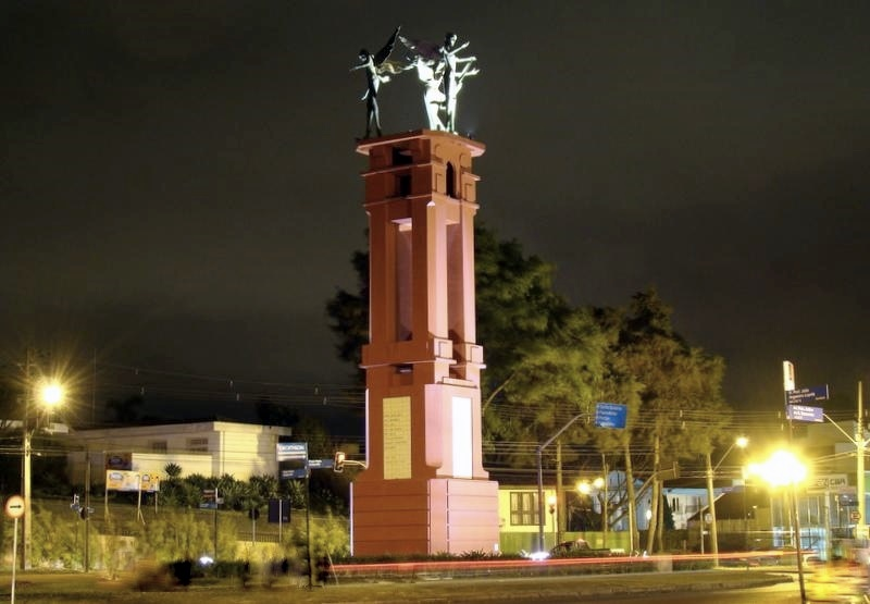 Fonte de Jerusalém, em Curitiba, Paraná, Sul do Brasil.